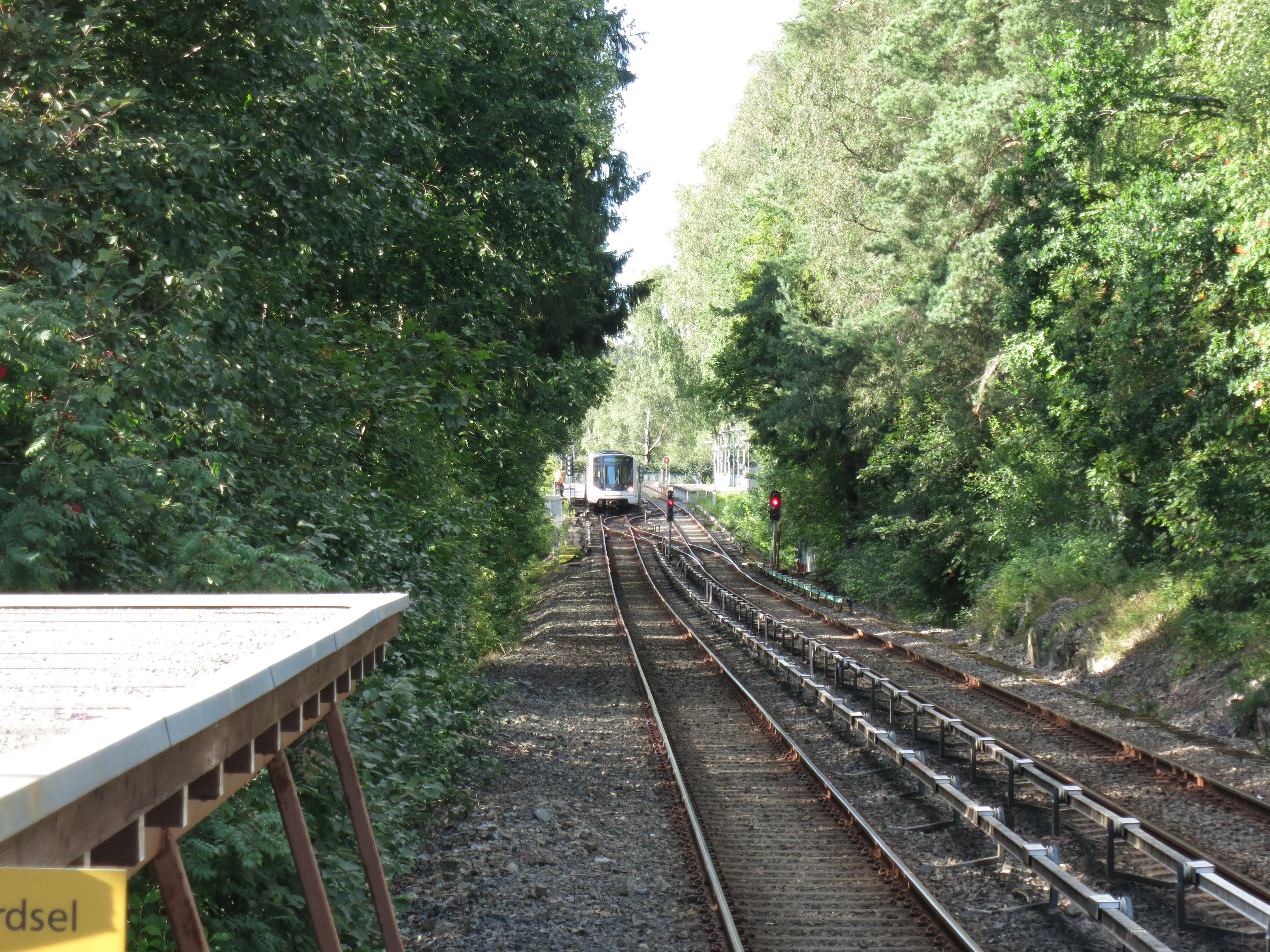 Sognsvann stasjon sett fra Kringsjå stasjon